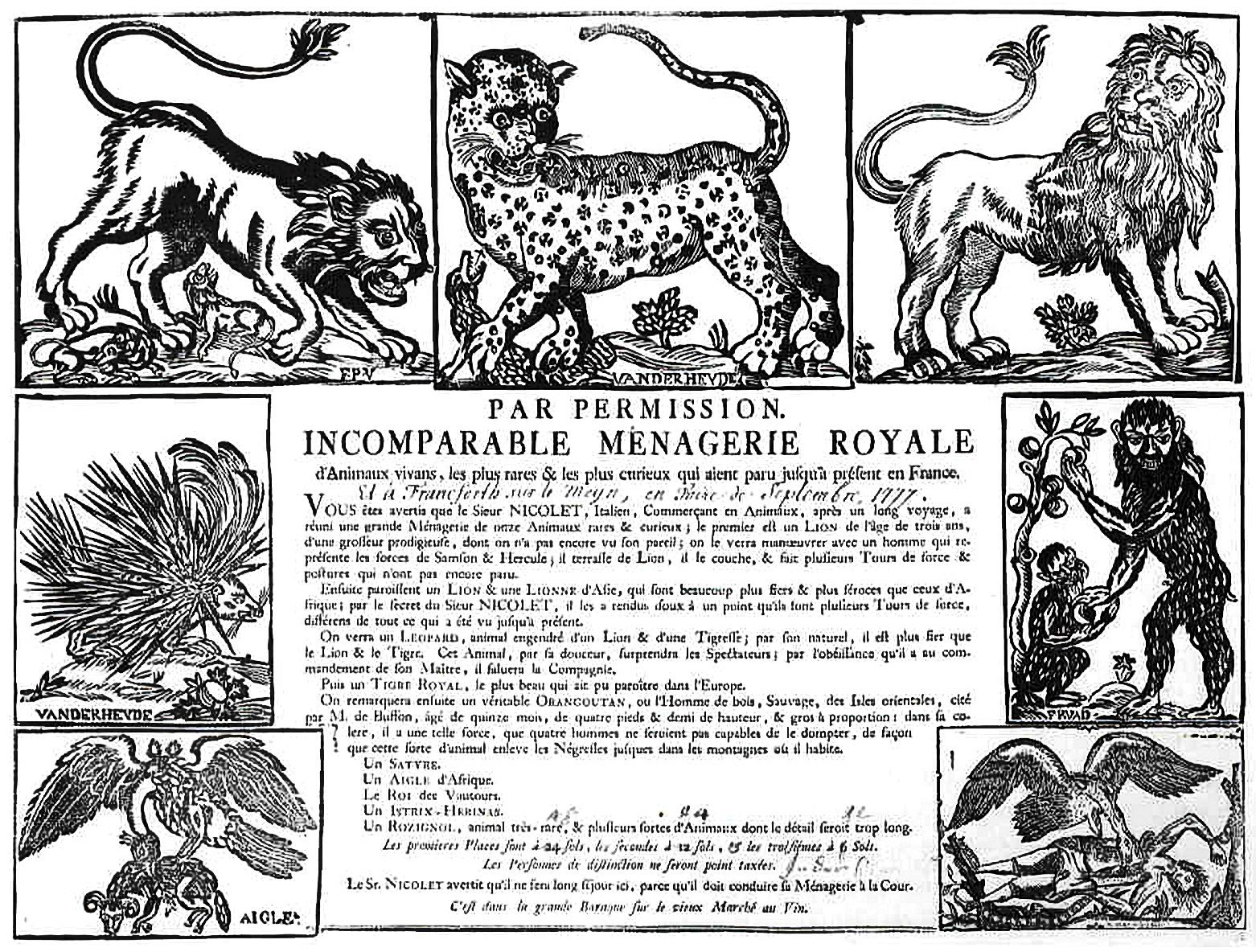 Tierschau des Jean-Baptiste(?) Nicolet Anschlagzettel mit sieben Holzschnitten verschiedener Tiere 1777 Historisches Museum, Frankfurt am Main